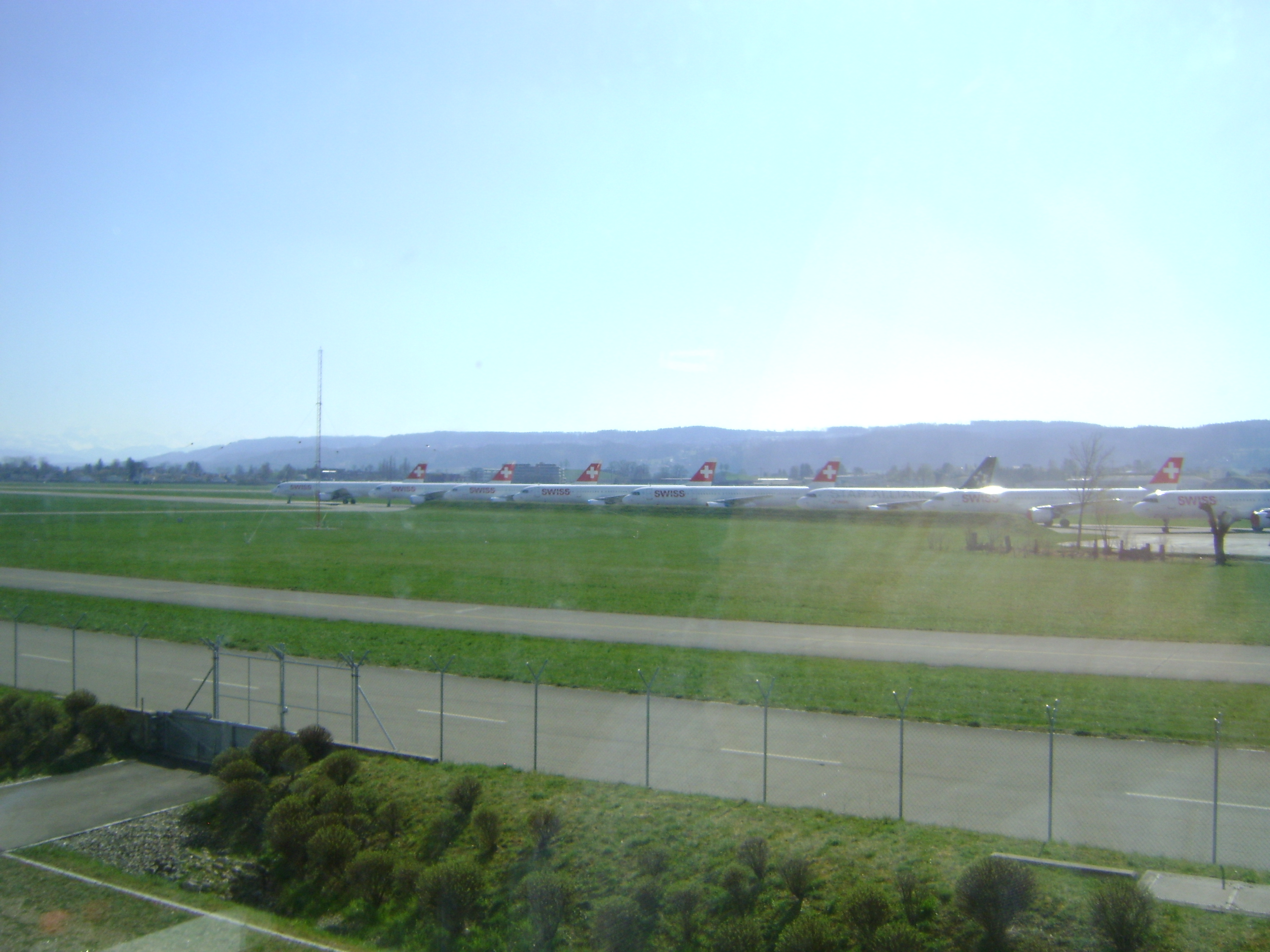 LSMD Corona